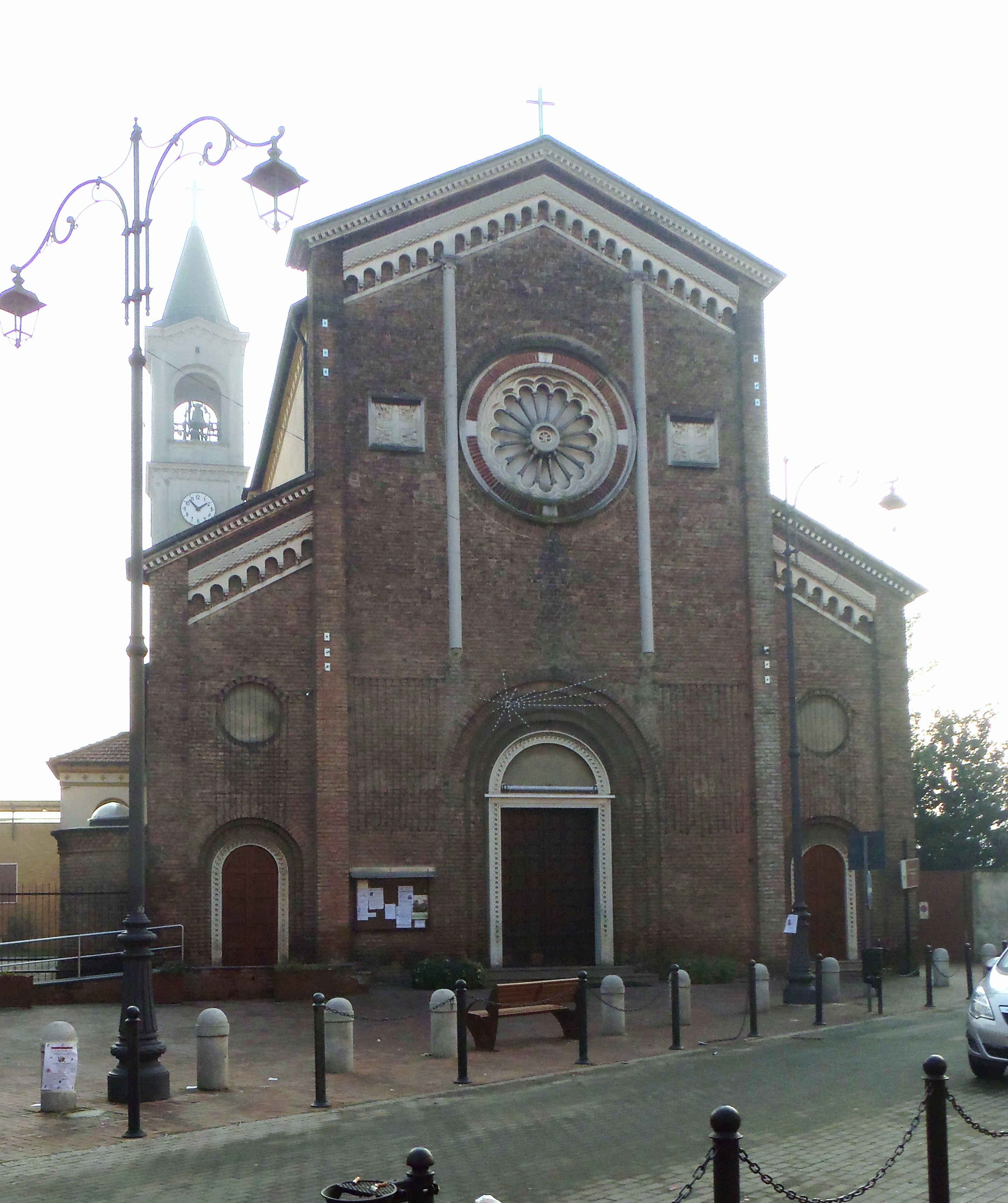 Chiesa parrocchiale di San Maurizio a San Maurizio al Lambro, frazione di Cologno Monzese